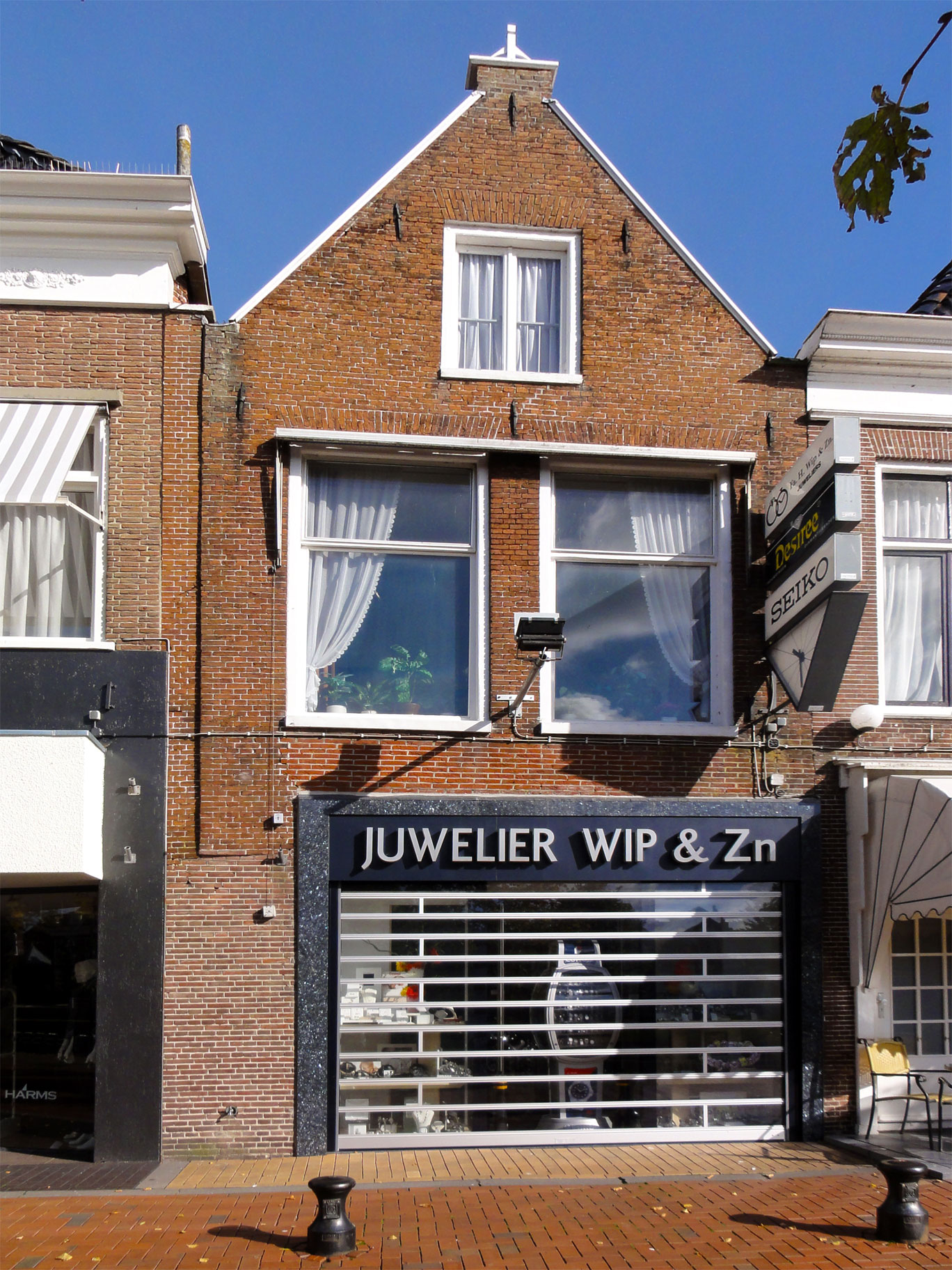 Diepswal 19 Dokkum, rijksmonument